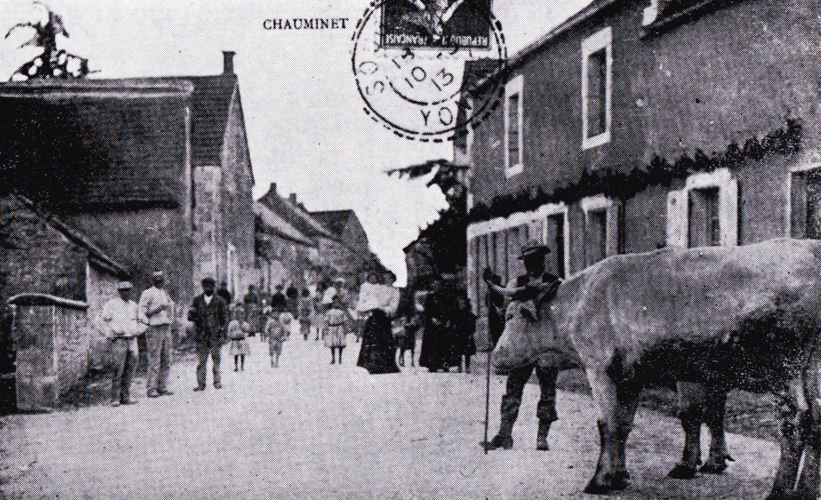 Chauminet au début du vingtième siècle - carte postale.